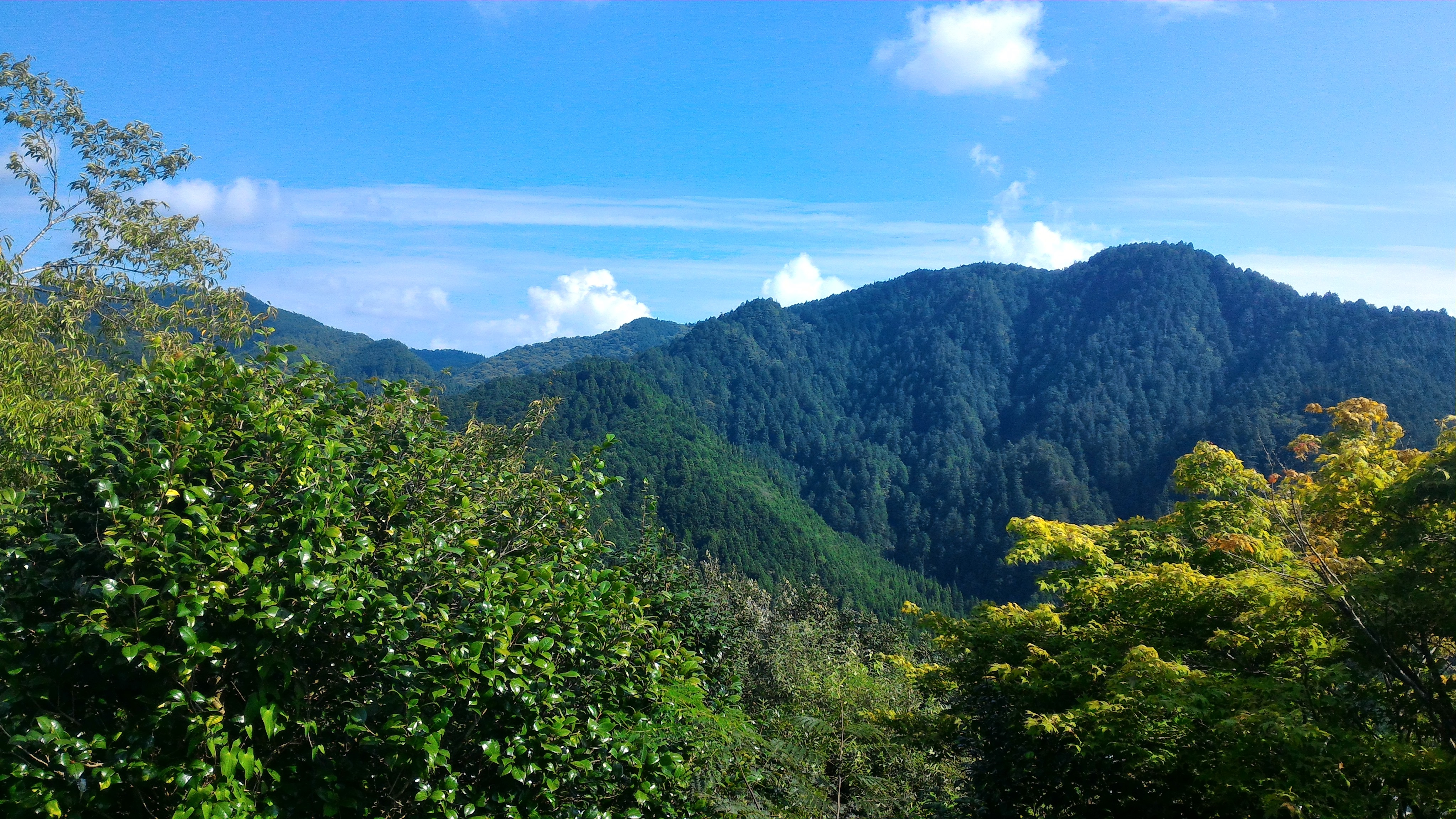 八幡城側から望む赤谷山。